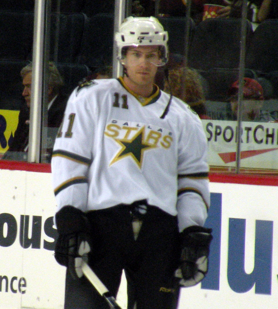 Dallas Stars forward Brendan Morrison during warm-up prior to a National Hockey League game against the Calgary Flames in Calgary.